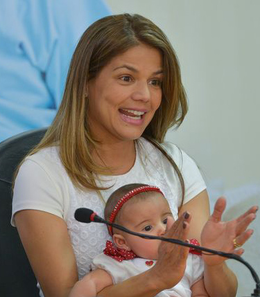 Ministério da Saúde lança campanha de aleitamento materno. Participa da solenidade a madrinha da campanha a atriz Nívea Stelmann, com sua filha.